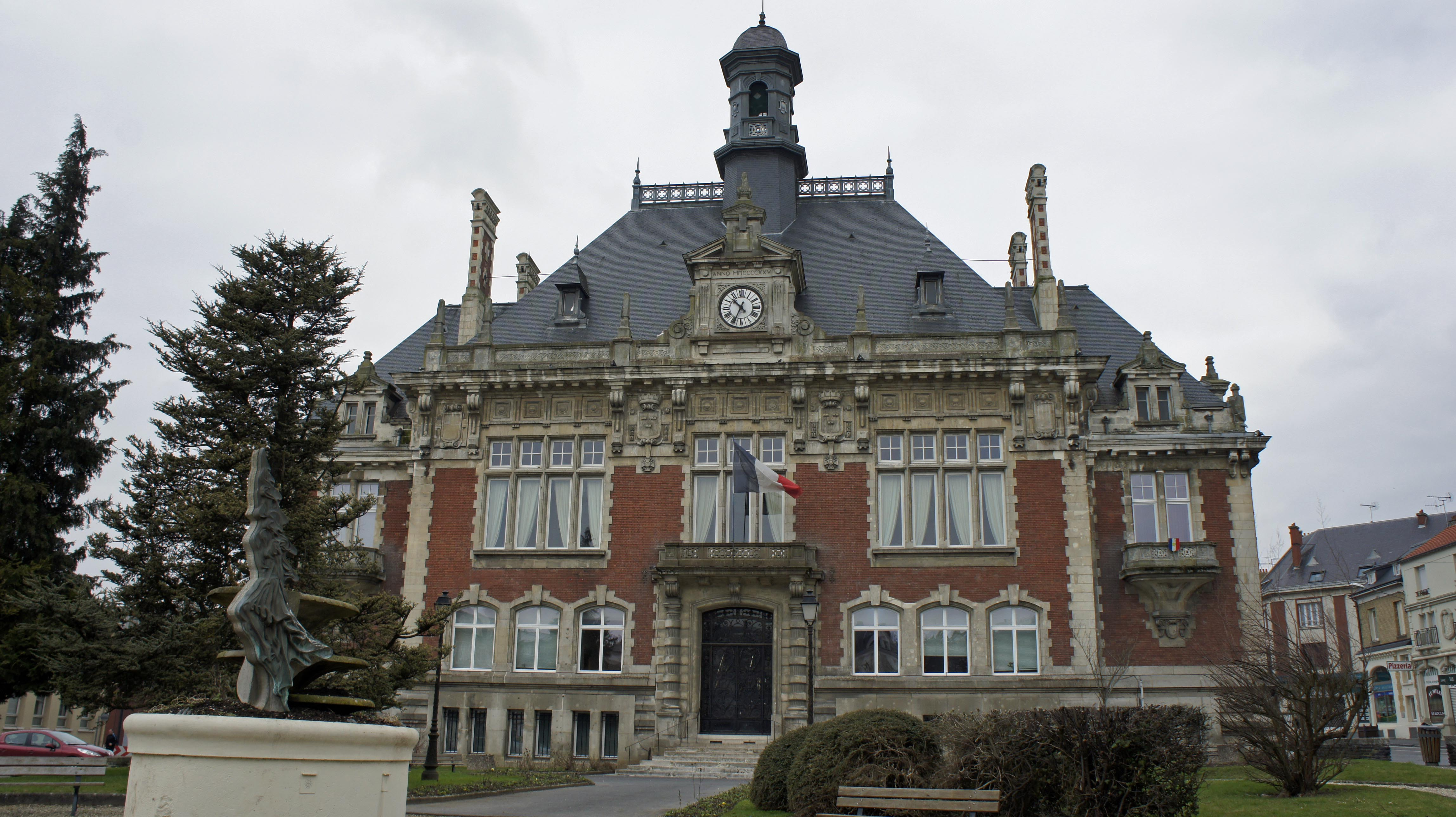 La Mairie_de Rethel.